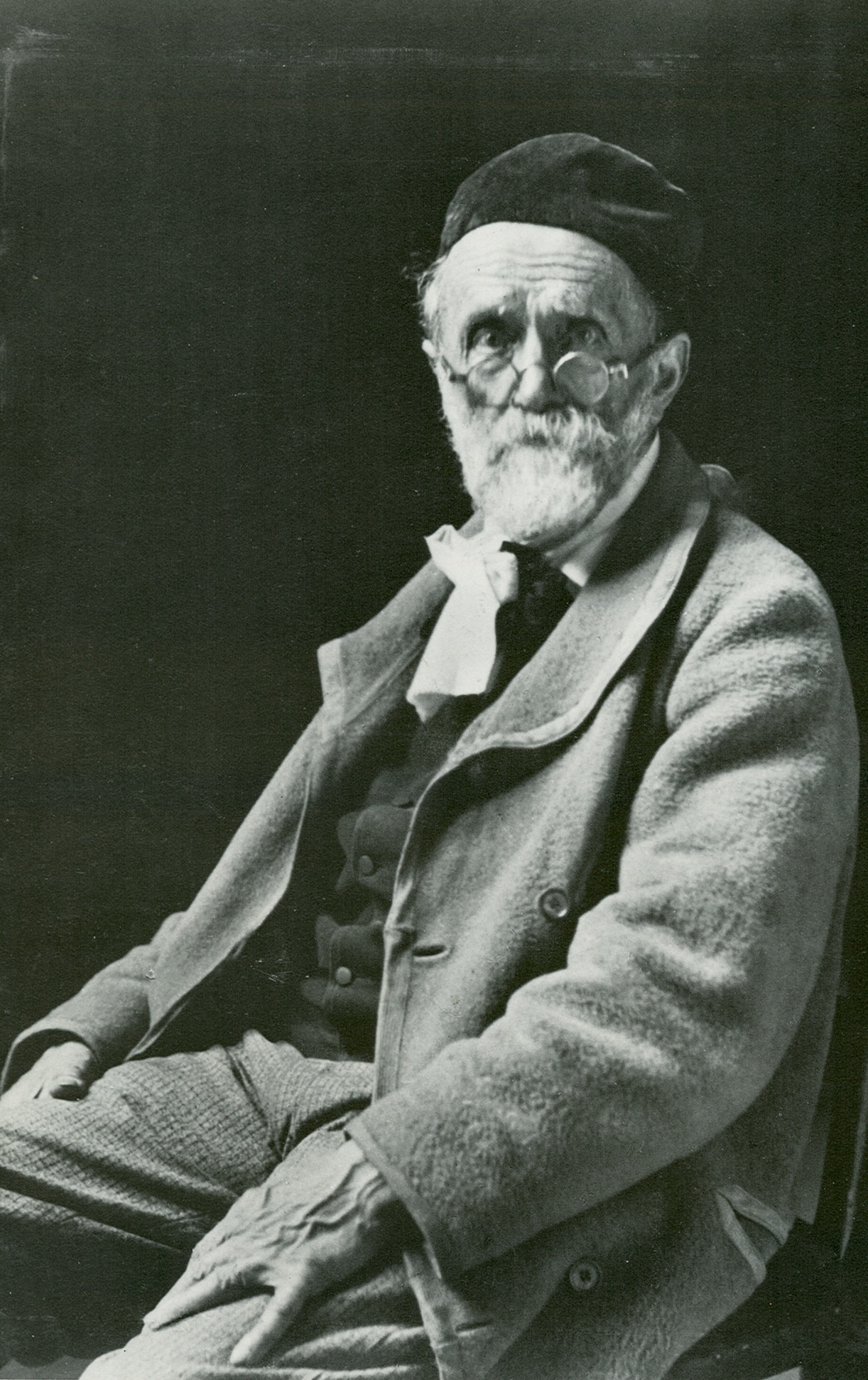 Albert Anker, Photo um 1901